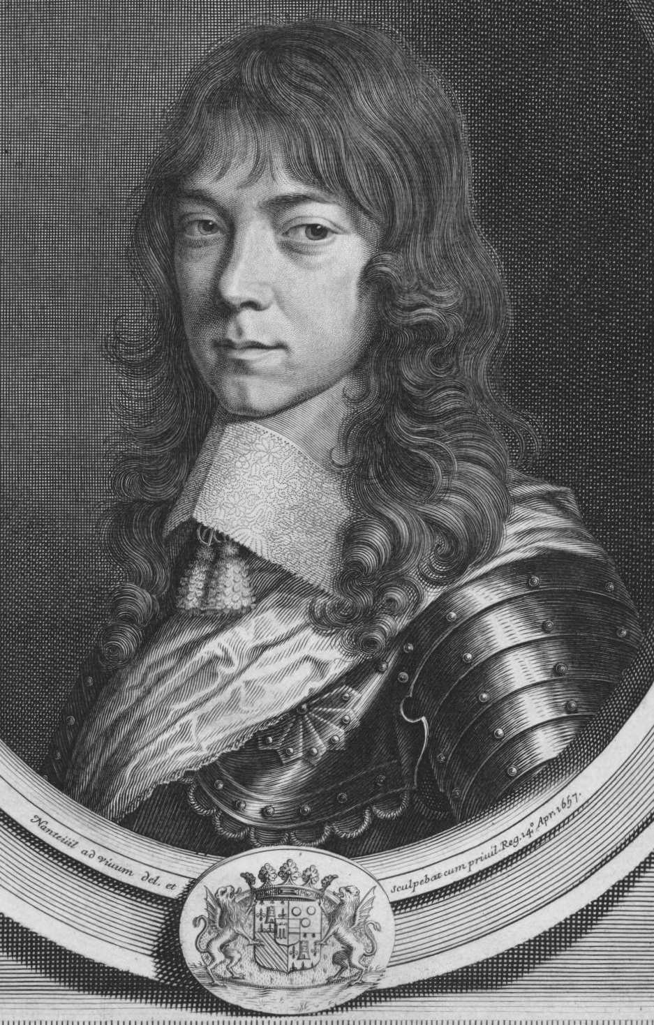 Porträt des Godefroy Maurice de La Tour d'Auvergne, Herzog von Bouillon